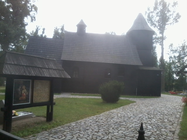 Widok ogólny drewnianego kościoła parafialnego pw. św.Marii Magdaleny w Starym Oleśnie